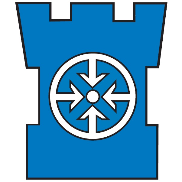 Logo of Finnish Reservist Sports Federation, Reserviläisurheiluliitto, RESUL